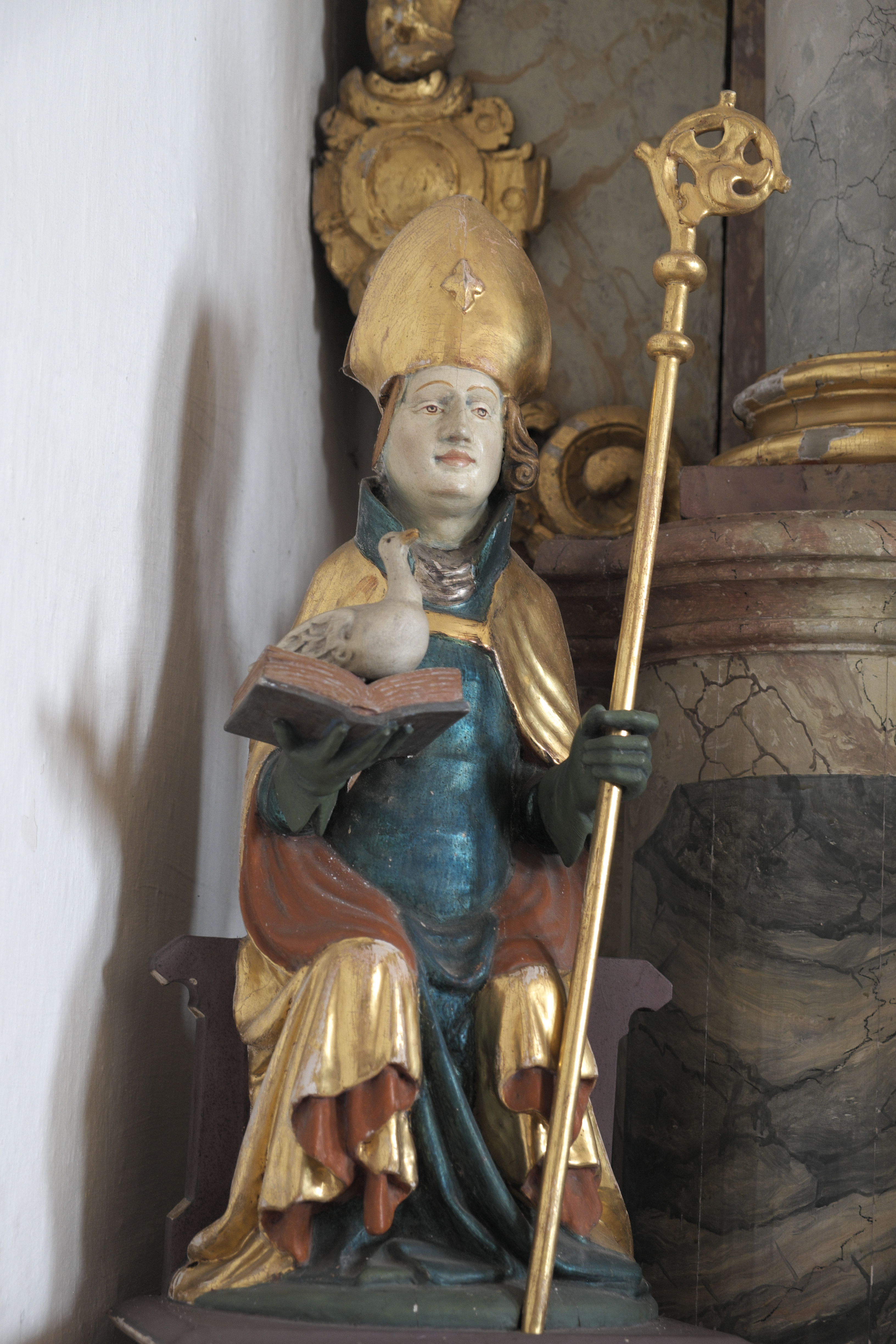 Katholische Filialkirche St. Martin in Niederstraubing (Steinkirchen) im Landkreis Erding (Bayern/Deutschland), Leonhardaltar, Skulptur des heiligen Martin, um 1440/50